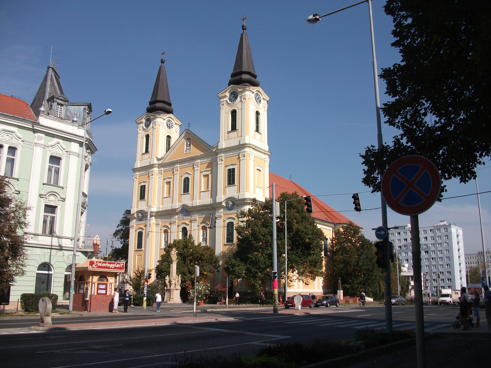 R. k. plébániatemplom (Zalaegerszeg, Szabadság tér)